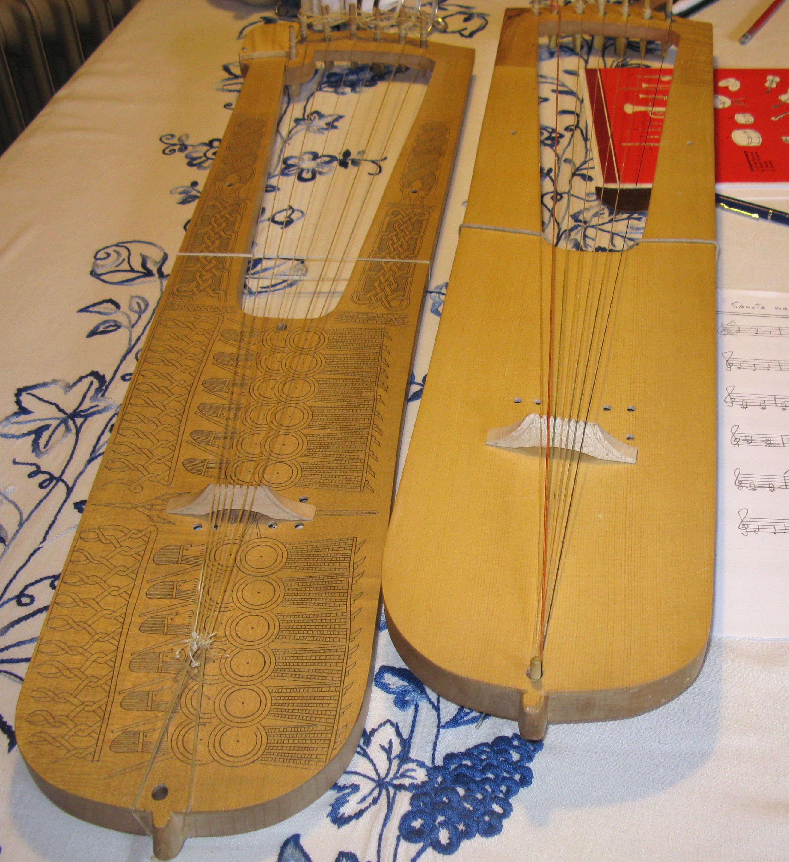 Zwei Nachbauten der Trossinger Leier links: originalgetreuer Nachbau der Trossinger Leier von Rainer M. Thurau, Harfenbauer in Wiesbaden, auf dem die Ornamente gut zu erkennen sind rechts: Nachbau von Arnold Lobisser, Hallstatt (ohne Verzierungen)